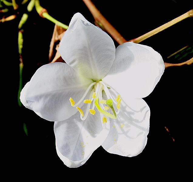 Bauhinia acuminata in Kolkata, West Bengal, India.